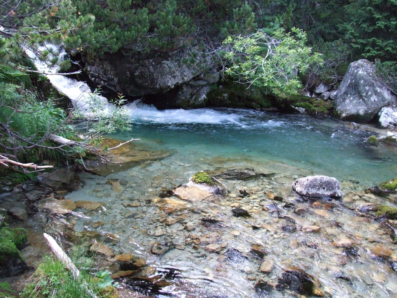 Zielony Potok Kieżmarski (Zelený potok) w Zielonej Dolinie Kieżmarskiej w Tatrach